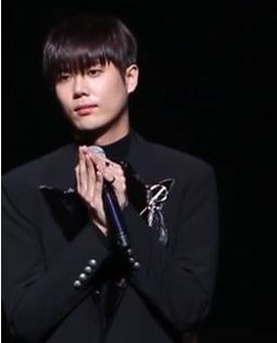 [TV10] 12월 8일 SS301 미니앨범 'ETERNAL 0,1' 쇼케이스 현장